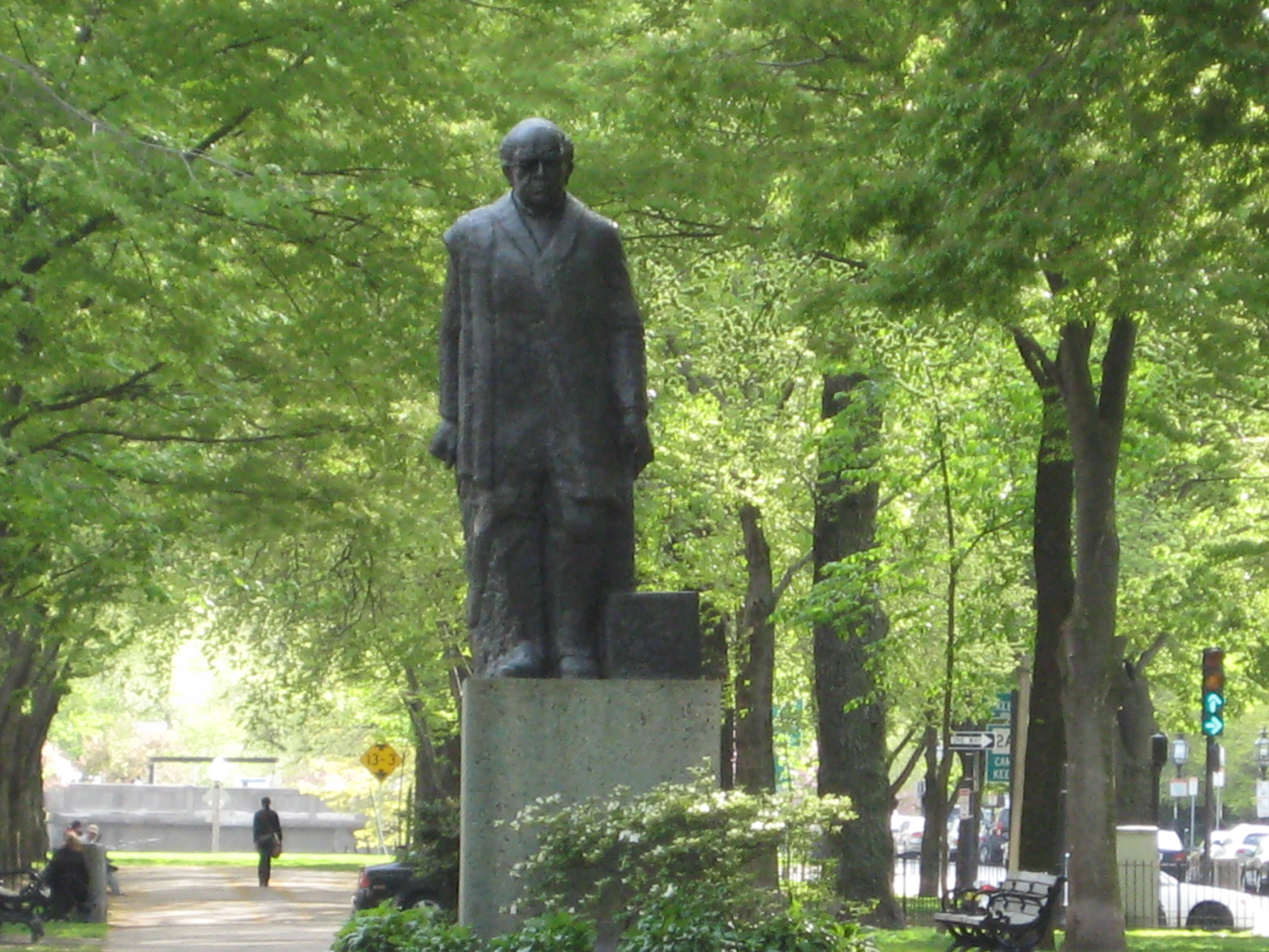 Monumento a Domingo F. Sarmiento en Boston, Massachusetts, EEUU